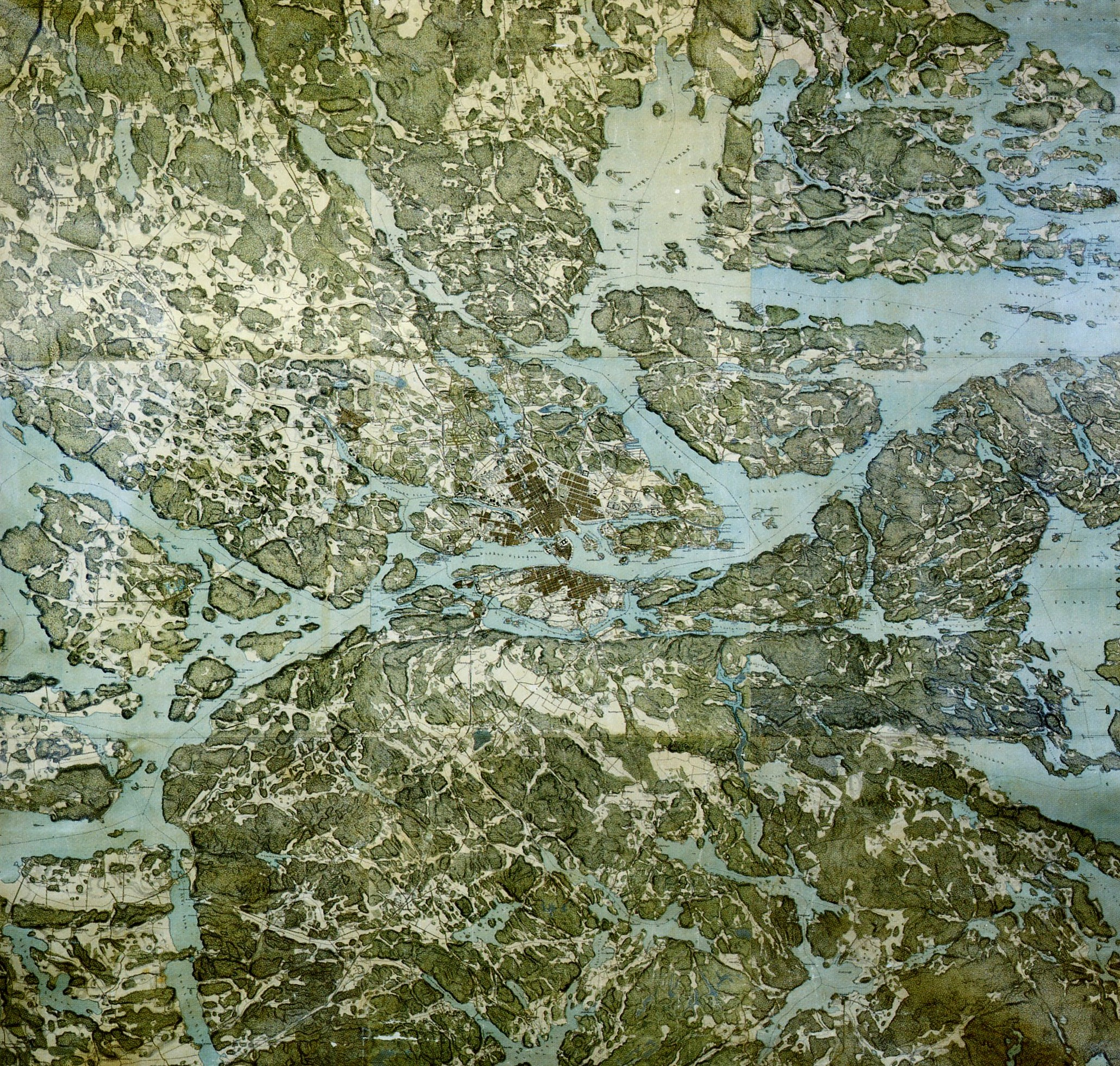 “Topografiska corpsens karta, Trakten kring Stockholm” i nio blad utgiven 1861, här en sammanställning av alla nio blad.